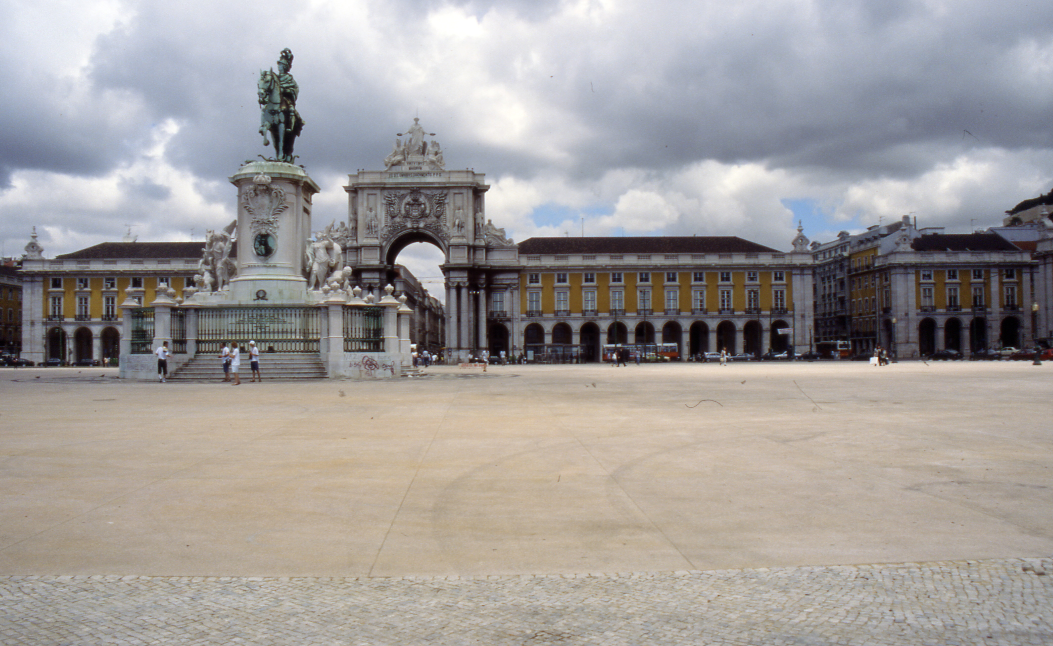 Terreiro do Paço in Lissabon